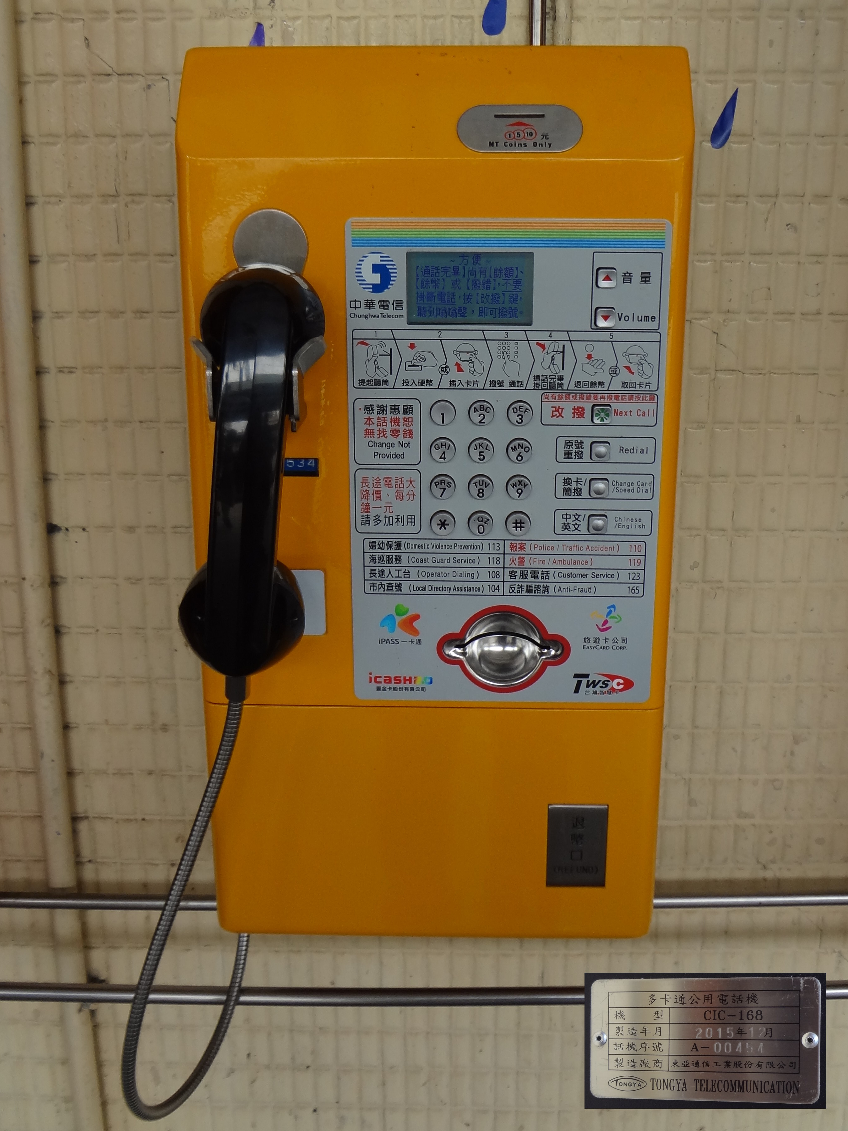 中華電信委託東亞通信製造的多卡通公用電話機CIC-168。